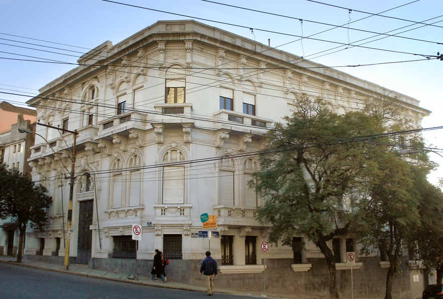 Palácio do Vice-Governador do Estado do Rio Grande do Sul, ou Palacinho, ou Palacete Santo Meneghetti, em Porto Alegre, Brasil.